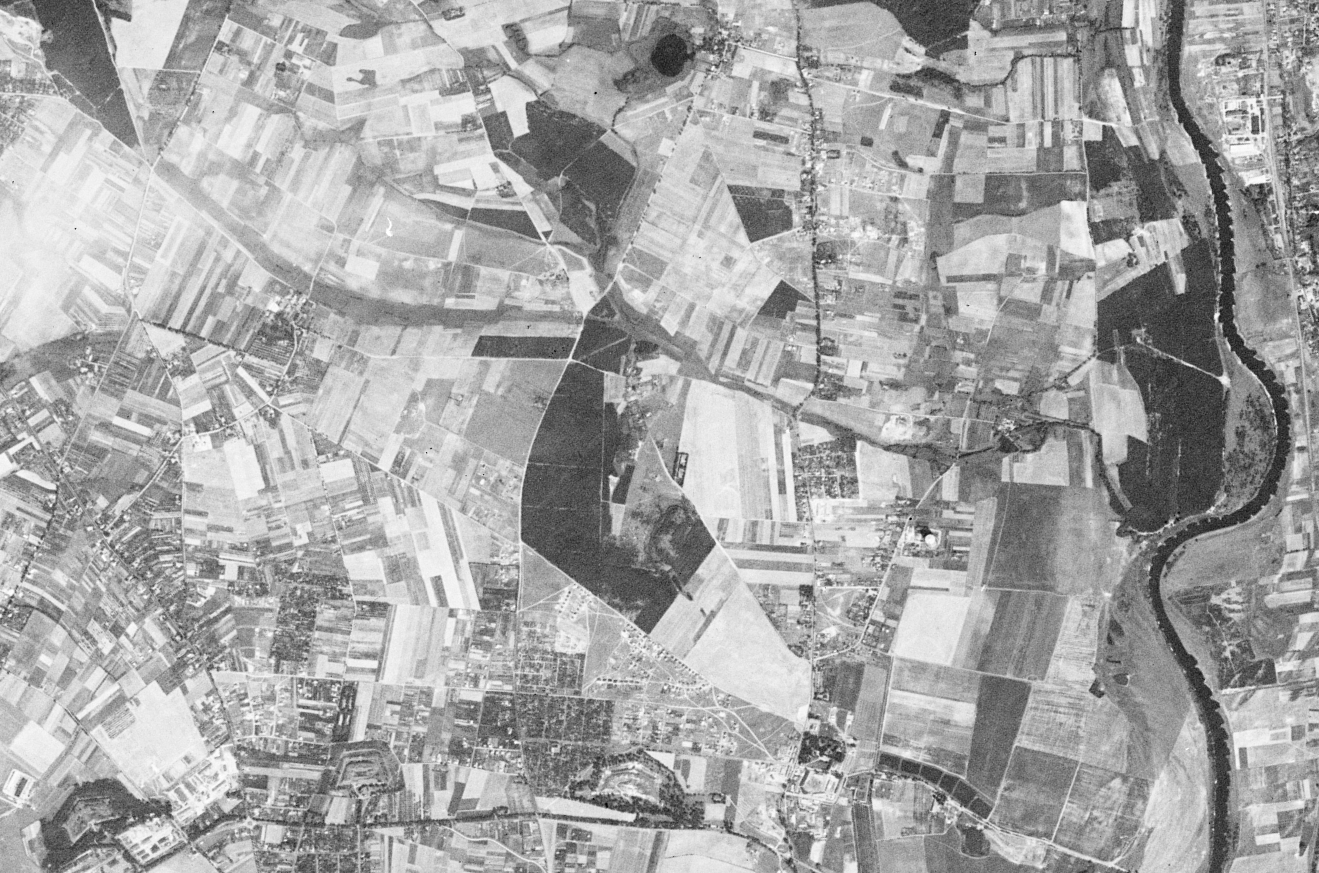 Tereny obecnego Piątkowa, Moraska, Umultowa i Naramowic sfotografowane przez amerykańskiego satelitę wywiadowczego KH-4A 1023, 23 sierpnia 1965 r. U dołu widoczne forty Twierdzy Poznań (od lewej): VI, Va i V.